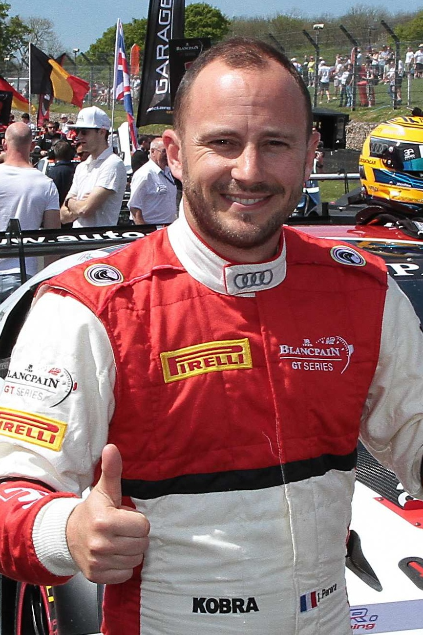 Franck Perera